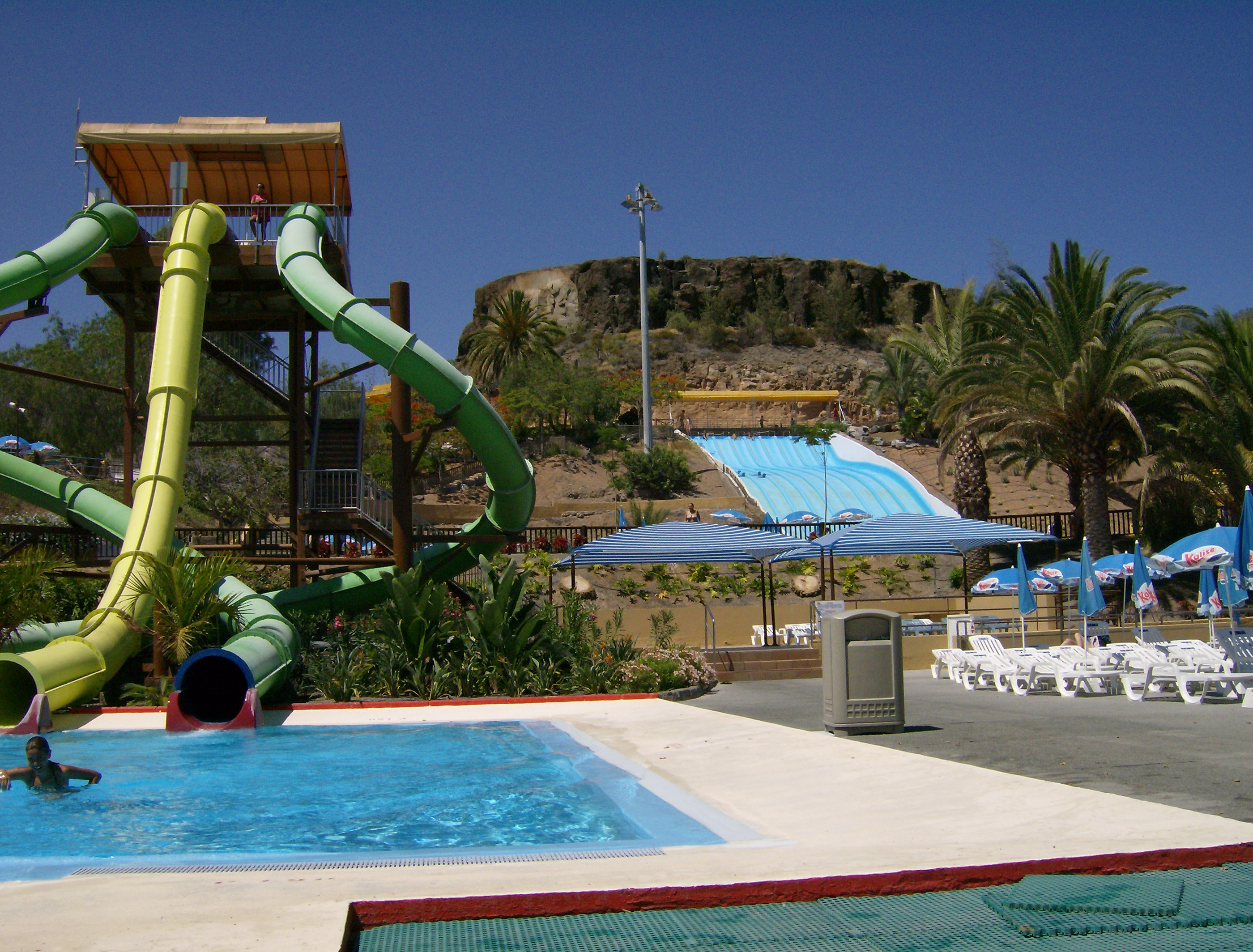 Aqualand Gran Canaria (Acuatic Park)